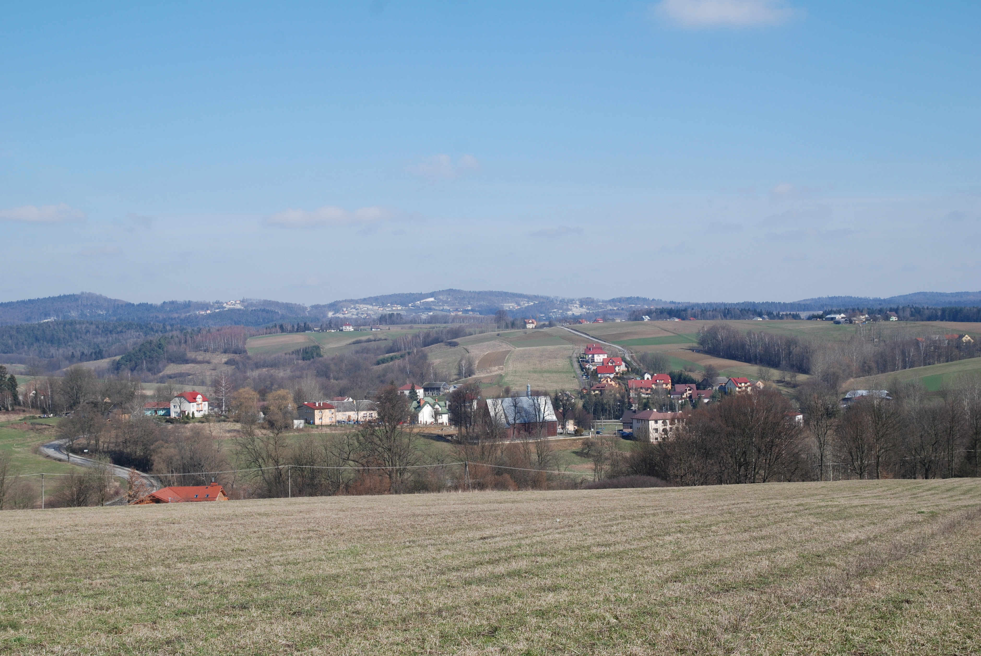 wieś Olszyny (gmina Rzepiennik Strzyżewski)